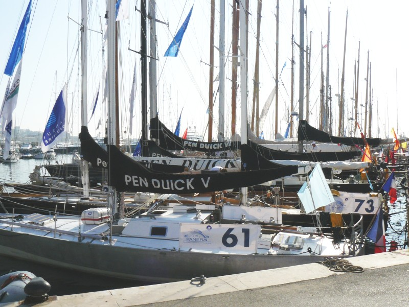 Des Pen Duick dans le vieux port de Cannes lors des régates royales de septembre 2009